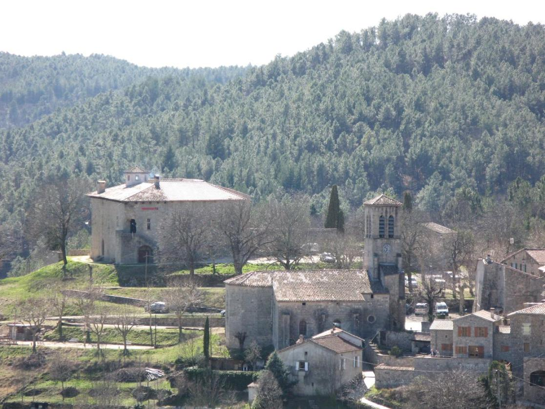 Village de Joannas (Ardèche)